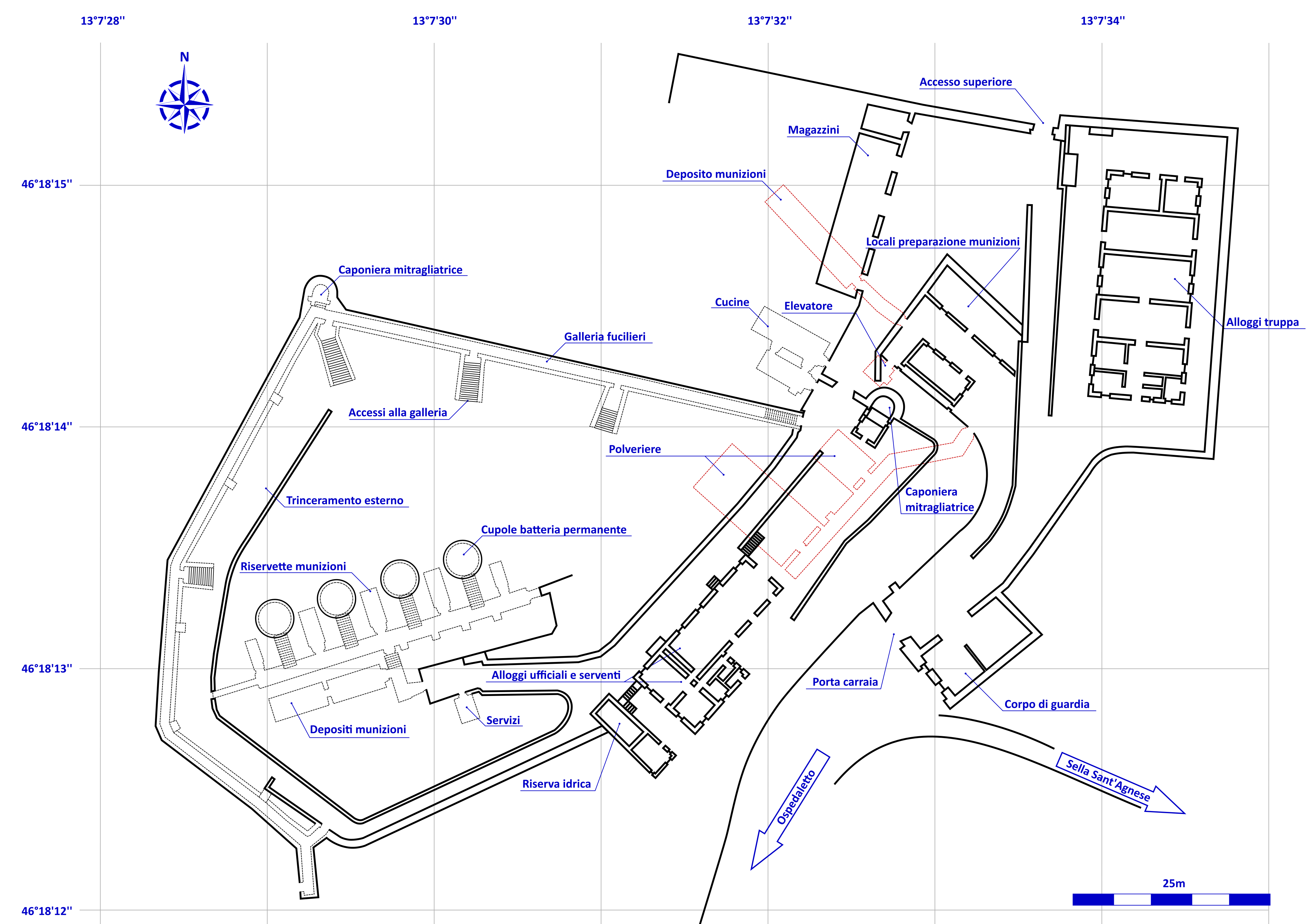 Planimetria del forte di Monte Ercole. (Ospedaletto di Gemona del Friuli - regione Friuli-Venezia Giulia)